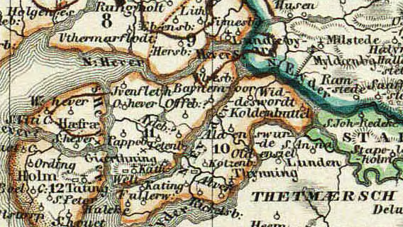 Detail fra "Slesvig i Valdemarernes Tid" efter Valdemars Jordebog